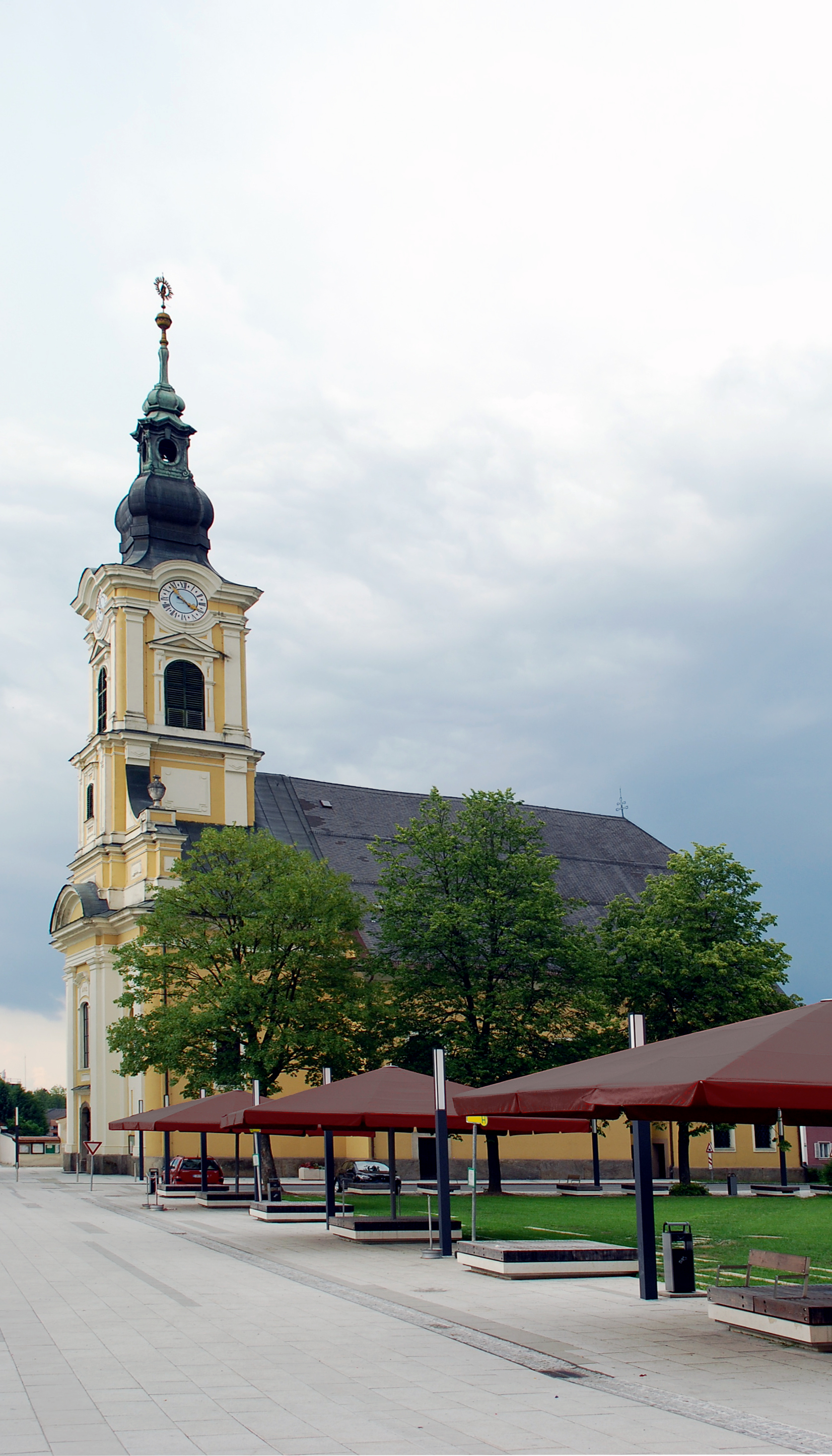 Wies, Steiermark, Österreich: Pfarrkirche